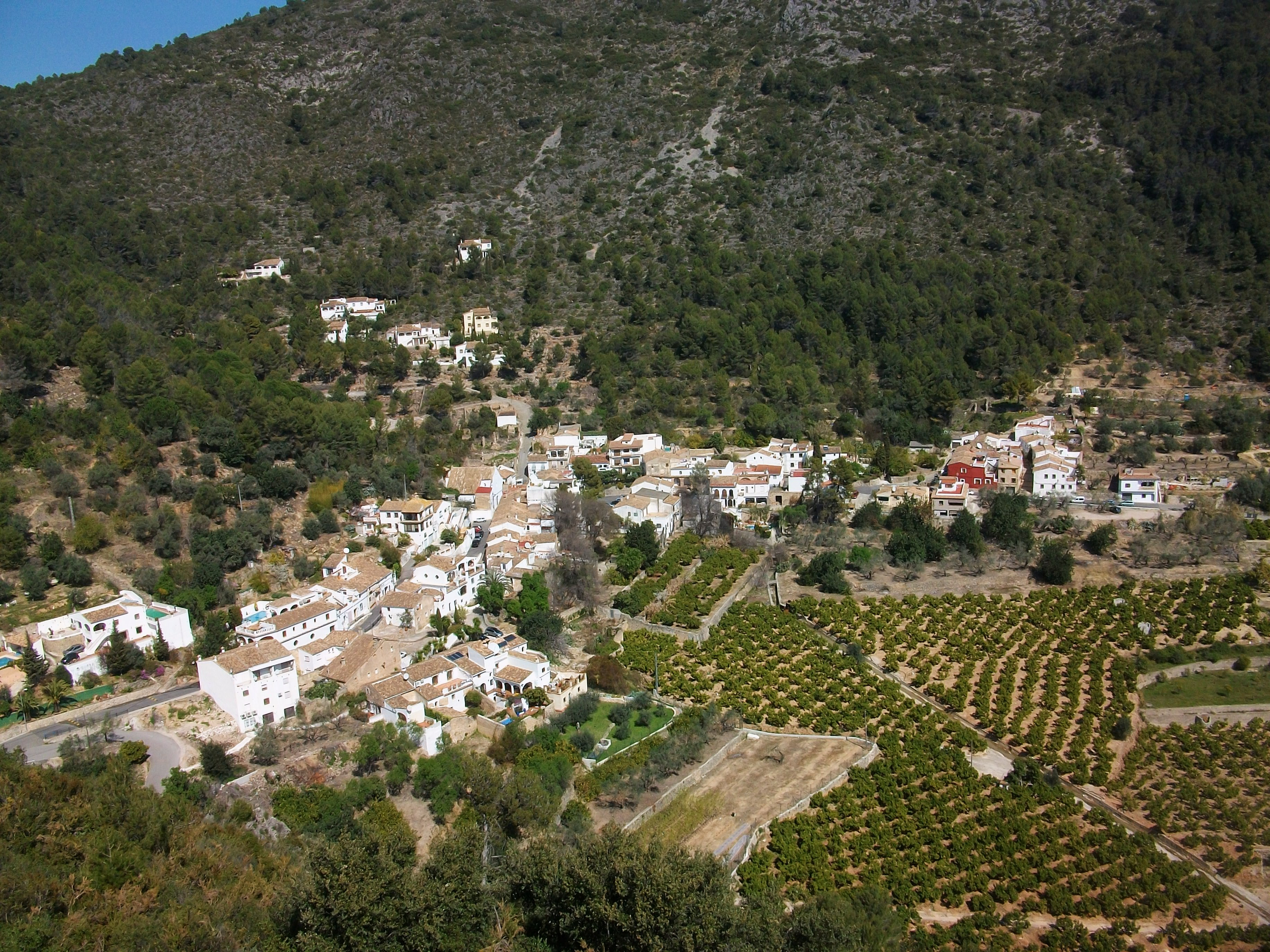 Vista de Forna des del castell.